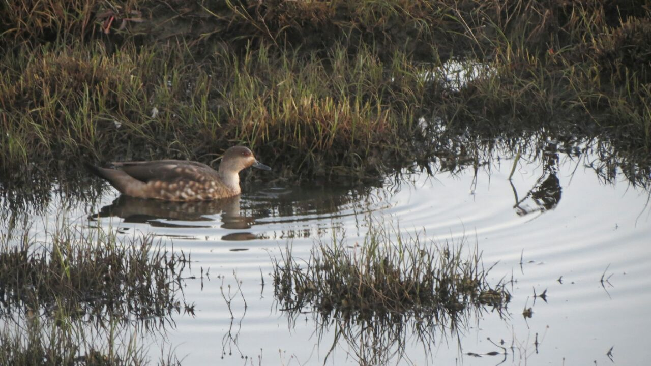 Animales viviendo en la Reserva Natural Laguna Nimez Laguna Nimez